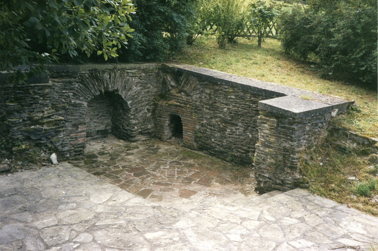 Mauerreste der Römervilla Kinheim-Kindel 1992